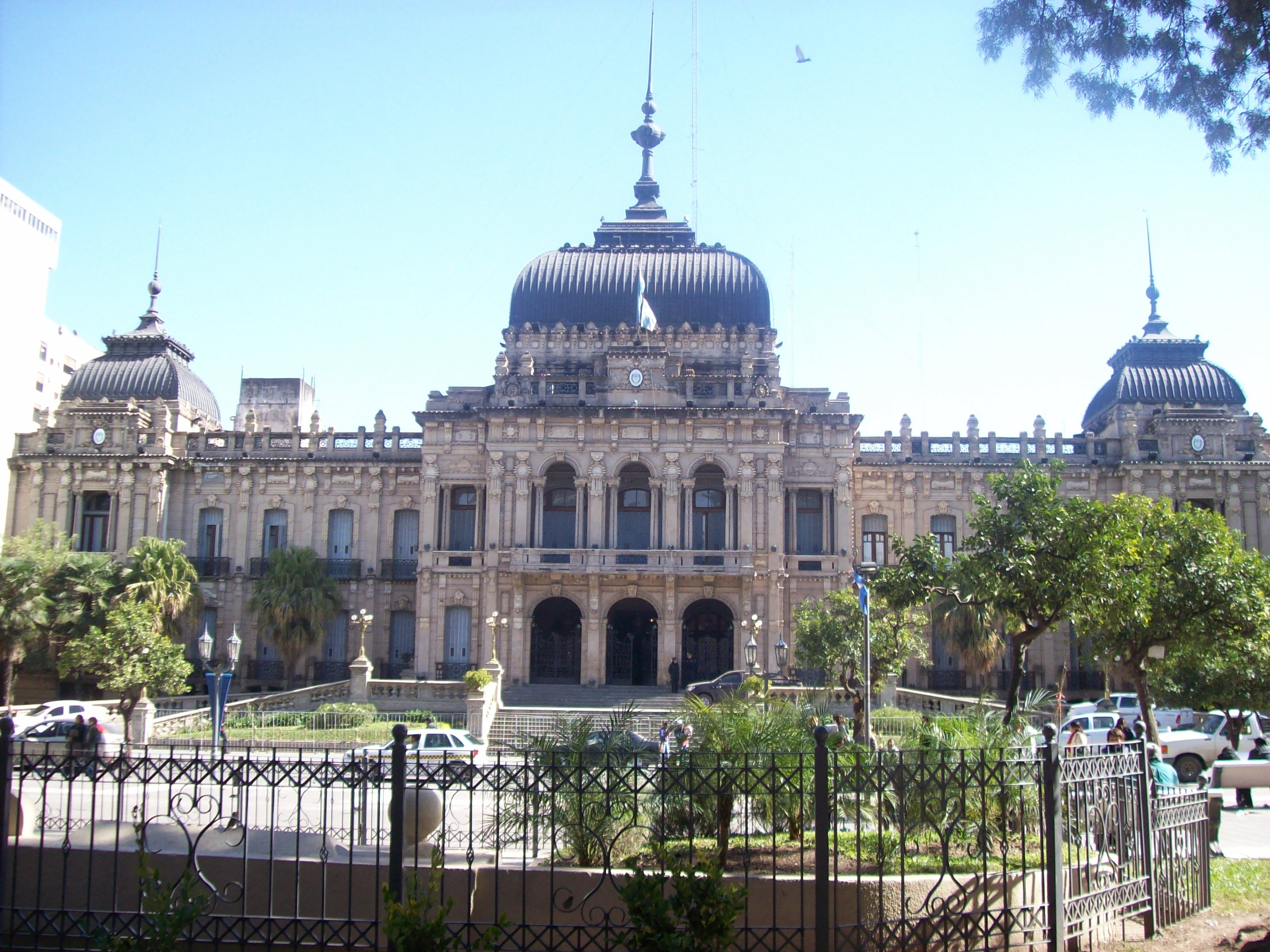 Frente de la Casa de Gobierno de la Provincia de Tucumán en la ciudad de San Miguel de Tucumán, Argentina.